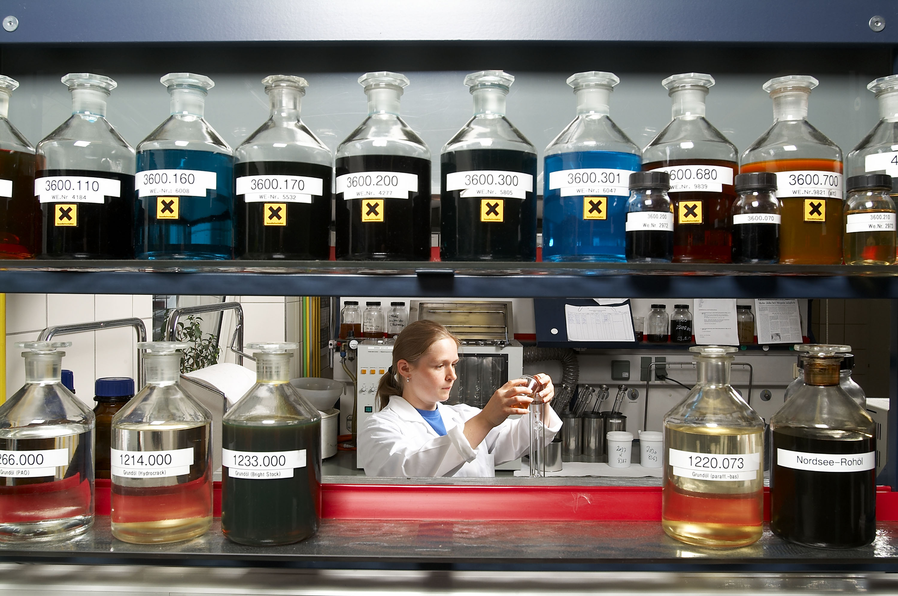 Labor Méguin